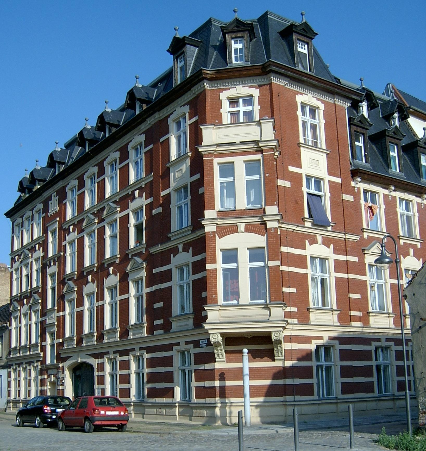 Gebäude Ziegelstraße 20 in Frankfurt (Oder).